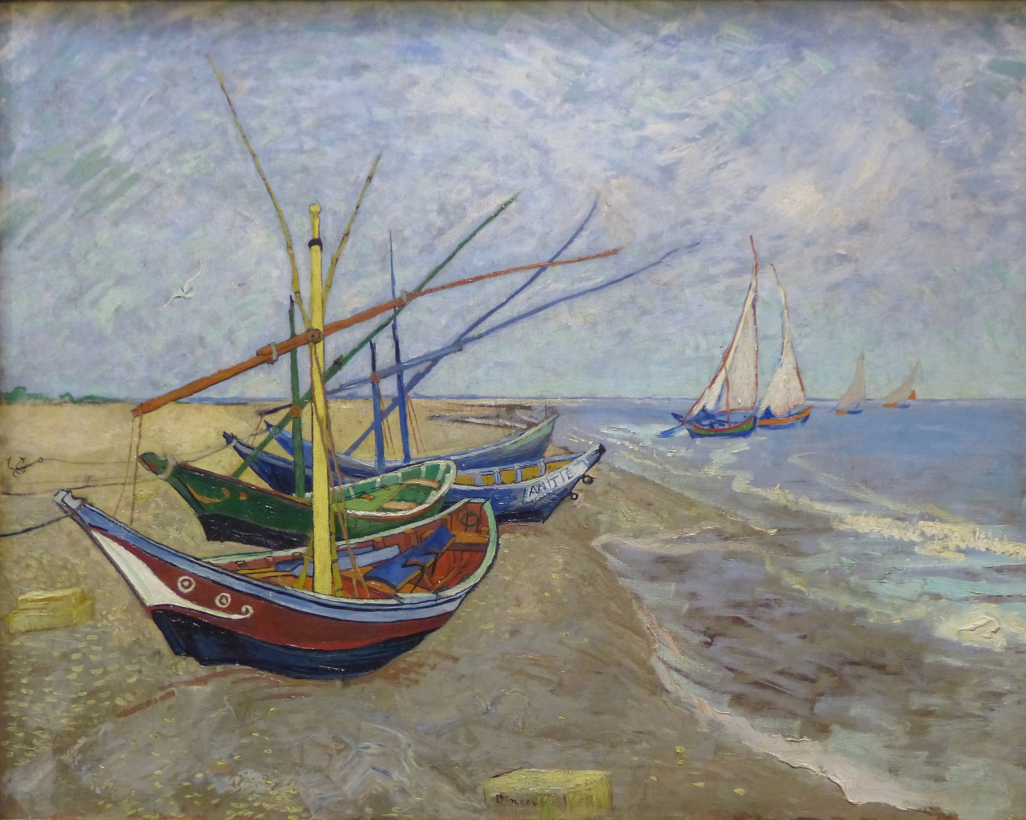 Arles (Bouches-du-Rhône, France), fondation Van Gogh, expo 2016.